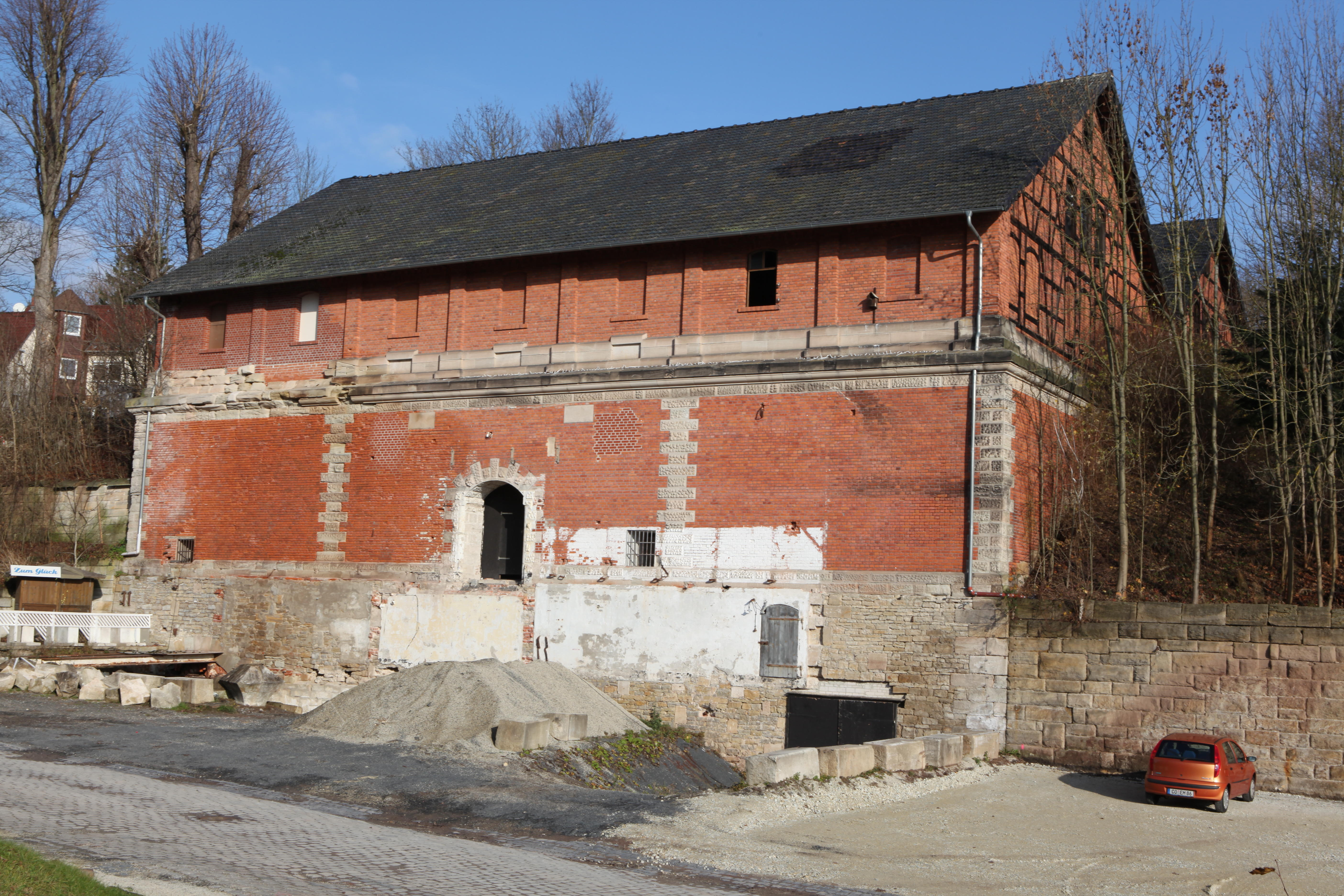 Am Hofbräuhaus in Coburg, Berghallen